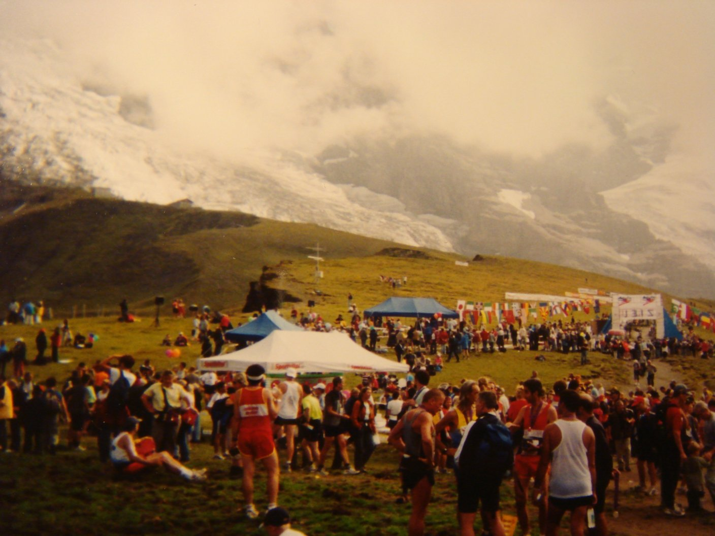 Maraton na Jungfrau, 2004